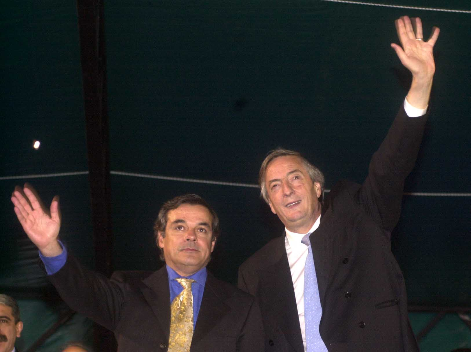 El Gobernador de la provincia de Misiones, Carlos Rovira, junto al presidente de la Nación, Néstor Kirchner.